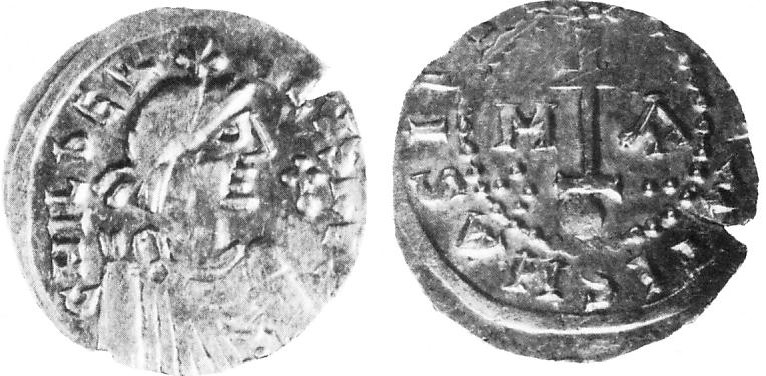 Sou d'or de Childéric II (avers et revers) frappé à Marseille.